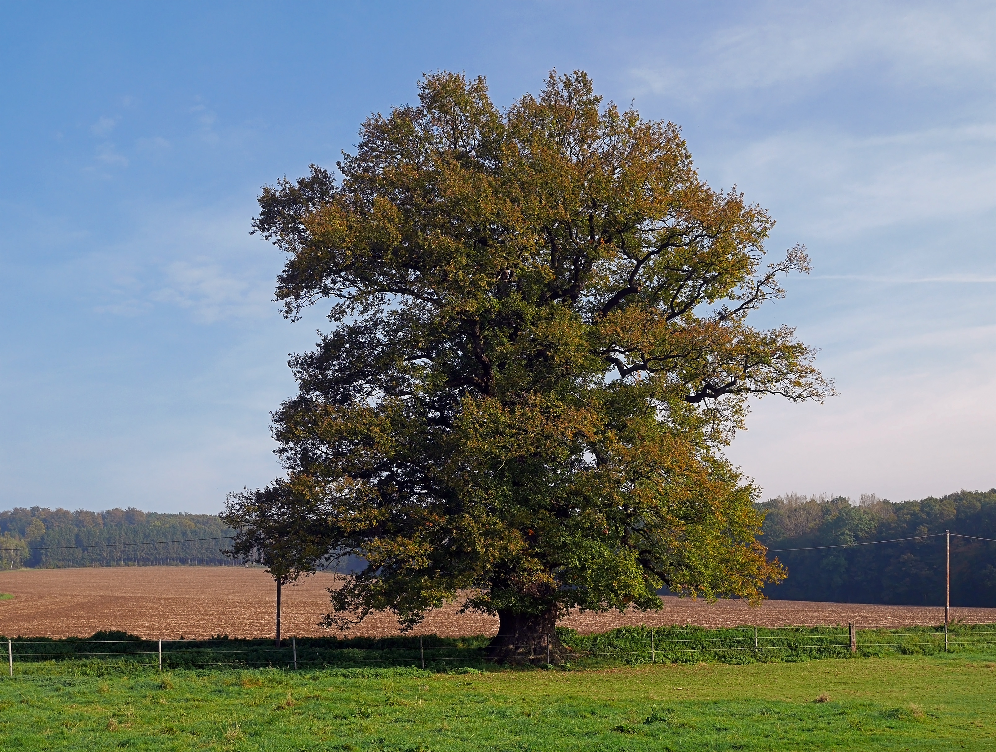 Die Stieleiche (Quercus robur) steht neben einem Feldweg bei Papenhausen völlig frei. Der Umfang in Brusthöhe beträgt 6,94 m, die Höhe beträgt 25 m.